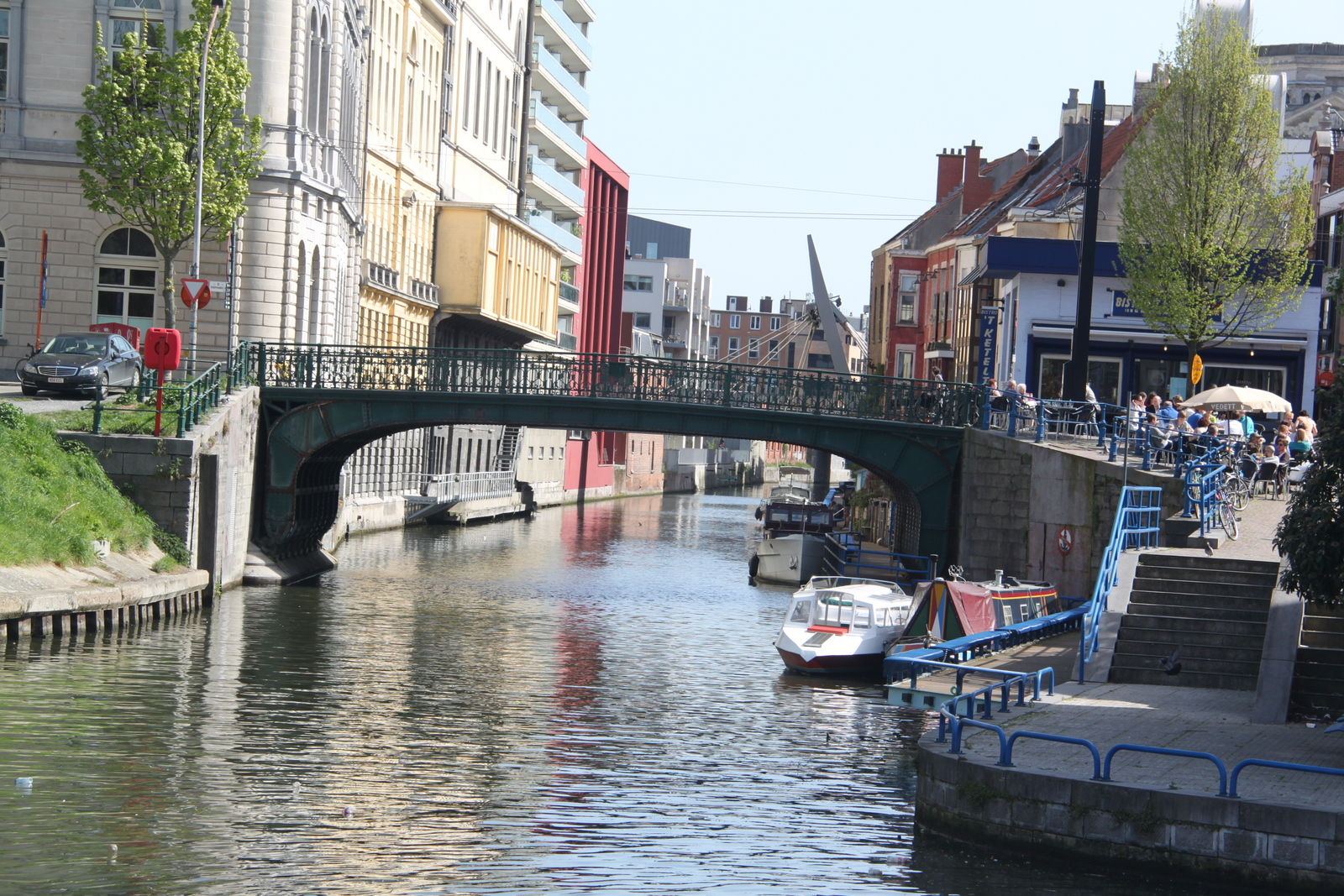 Ghent, Belgium on 2011-04-10